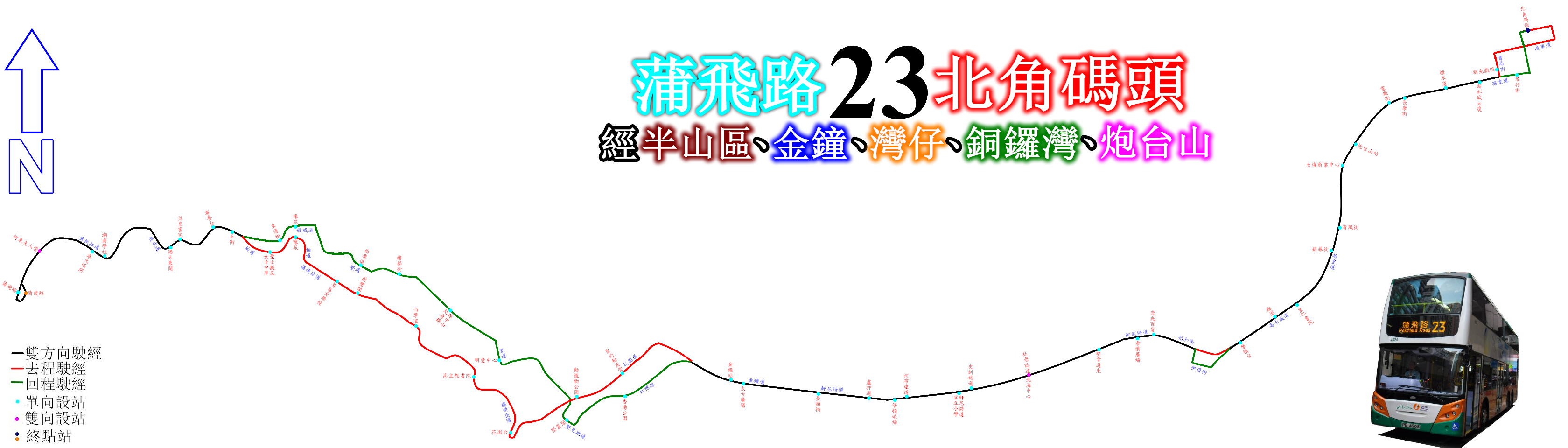 中文（香港）: 新巴23線的走線圖，在半山區大部份走線都不相同